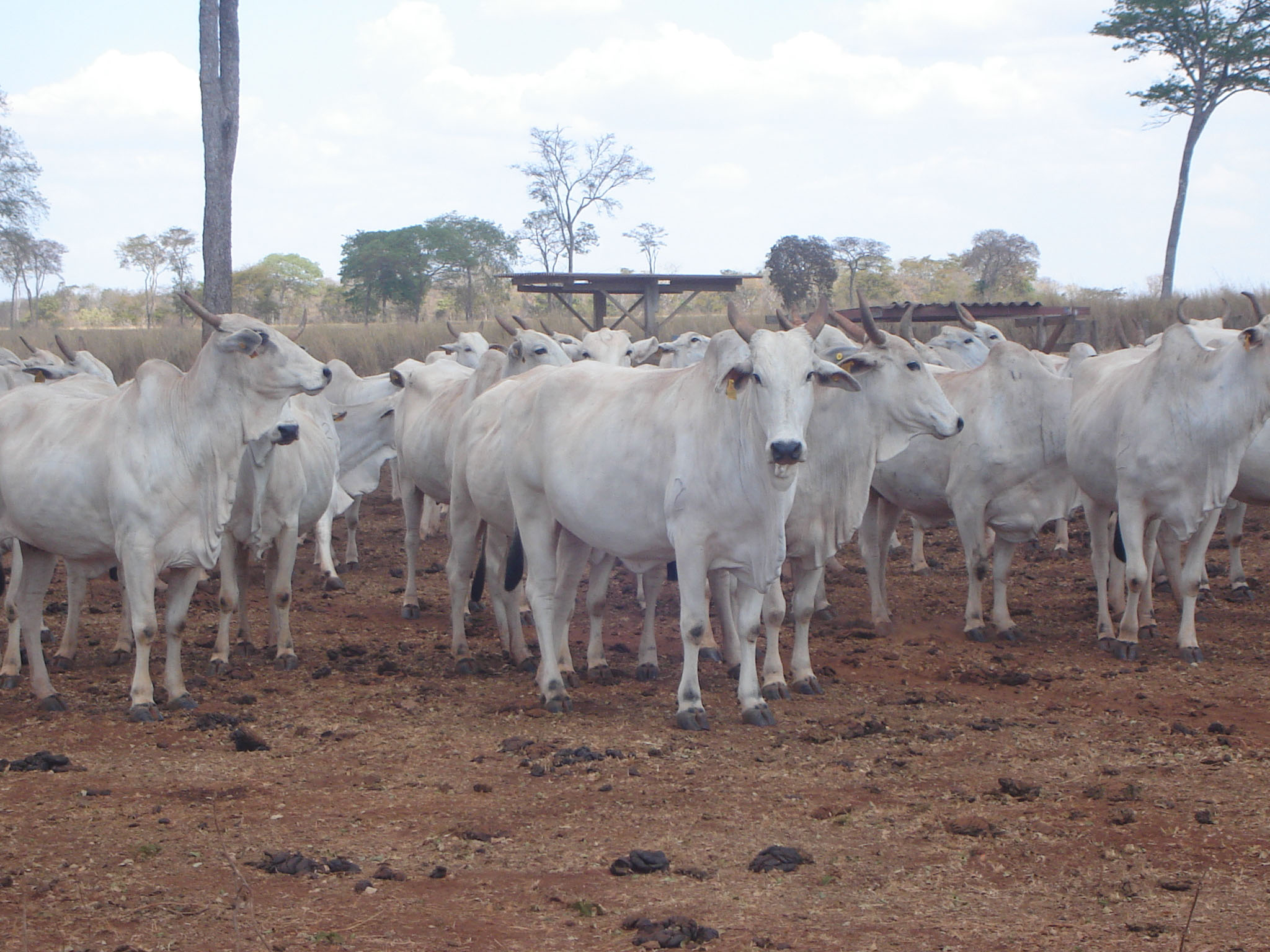 Vacas recebem técnica da IATF para emprenharem ao mesmo tempo